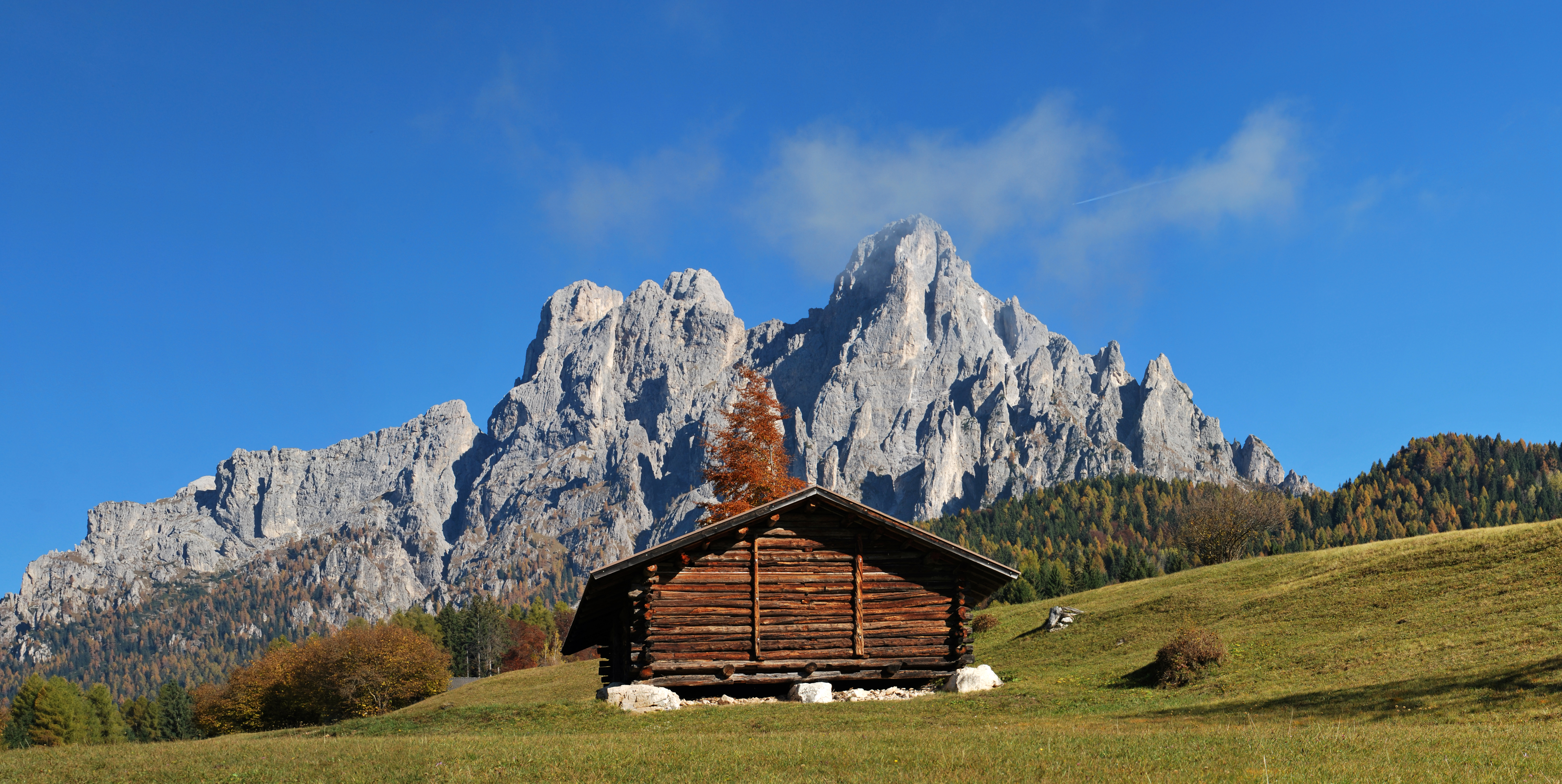 Parco naturale Paneveggio - Pale di San Martino (Q267909)